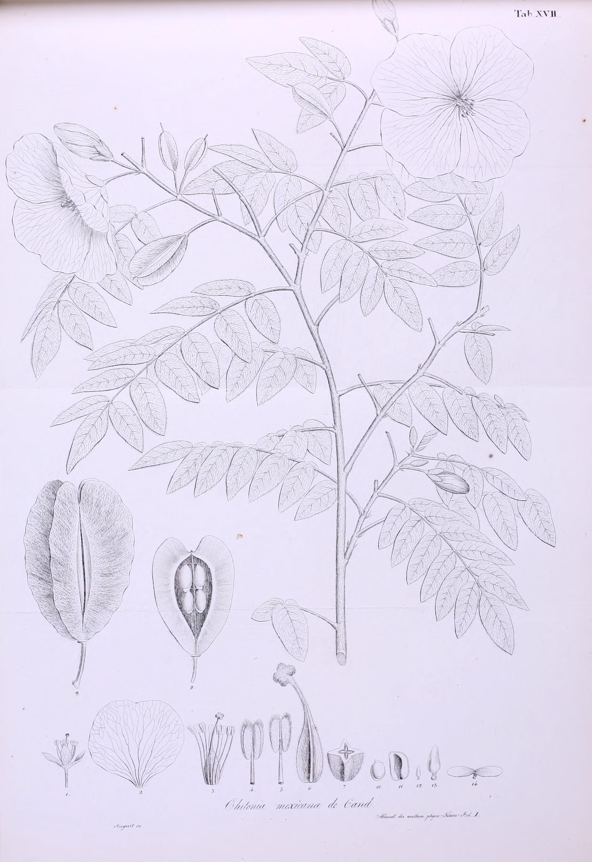 Abhandlungen der Mathematisch-Physikalischen Klasse der Königlich Bayerischen Akademie der Wissenschaften.